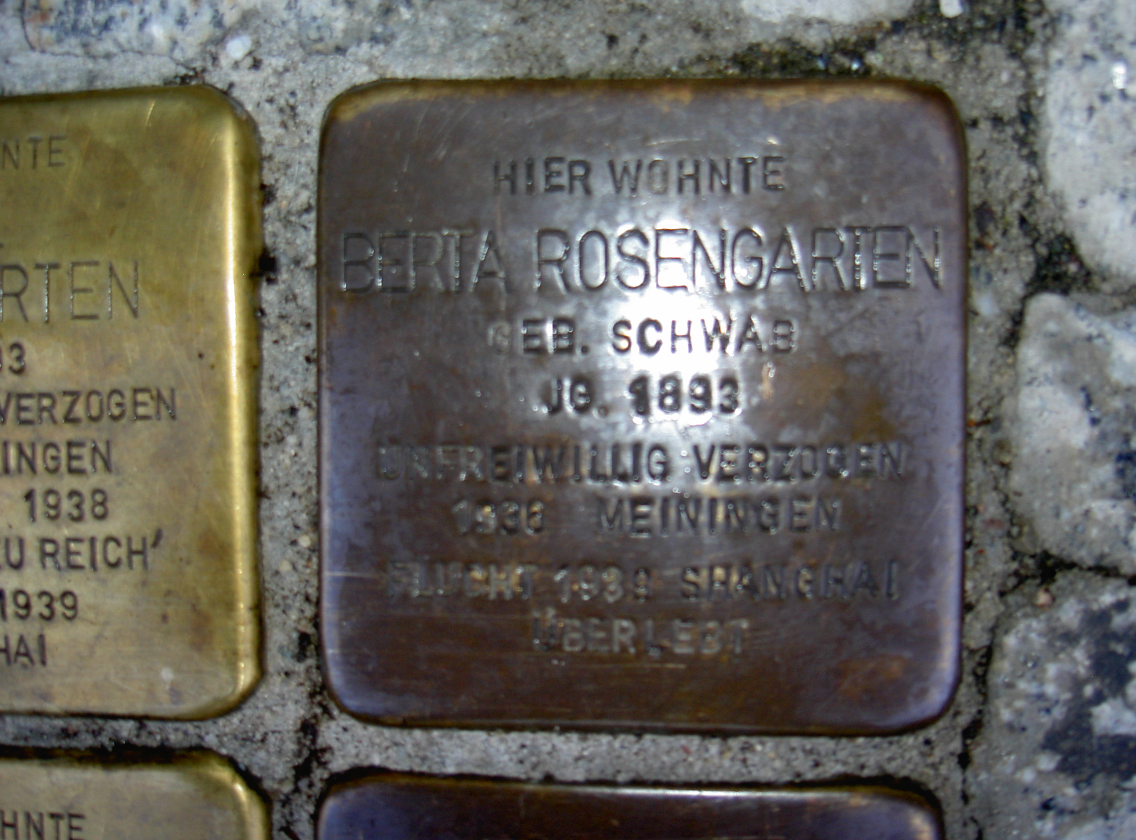 Stolperstein in Themar Rosengarten Berta